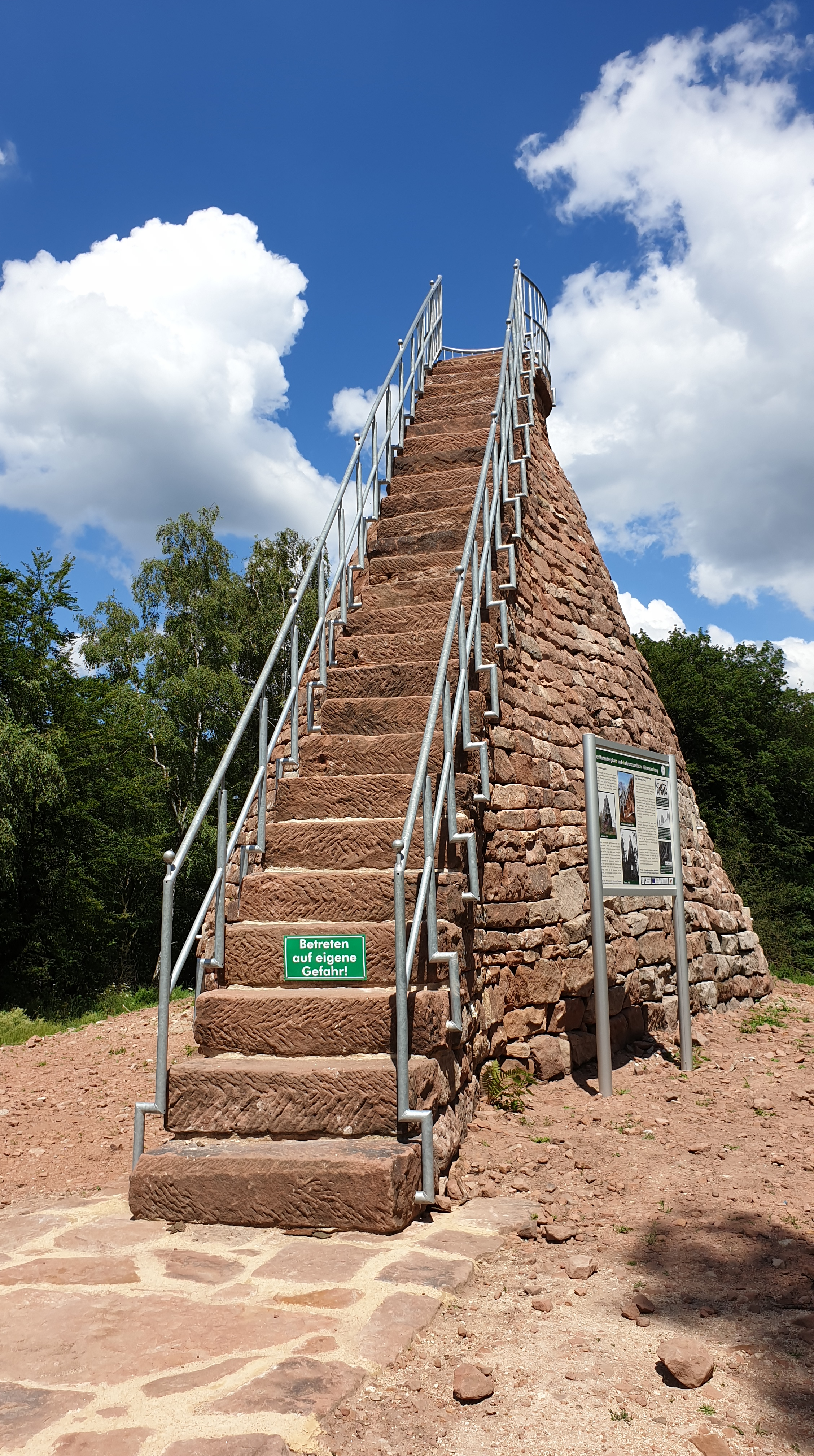 Hohenbergturm - nach Wiederaufbau 2019